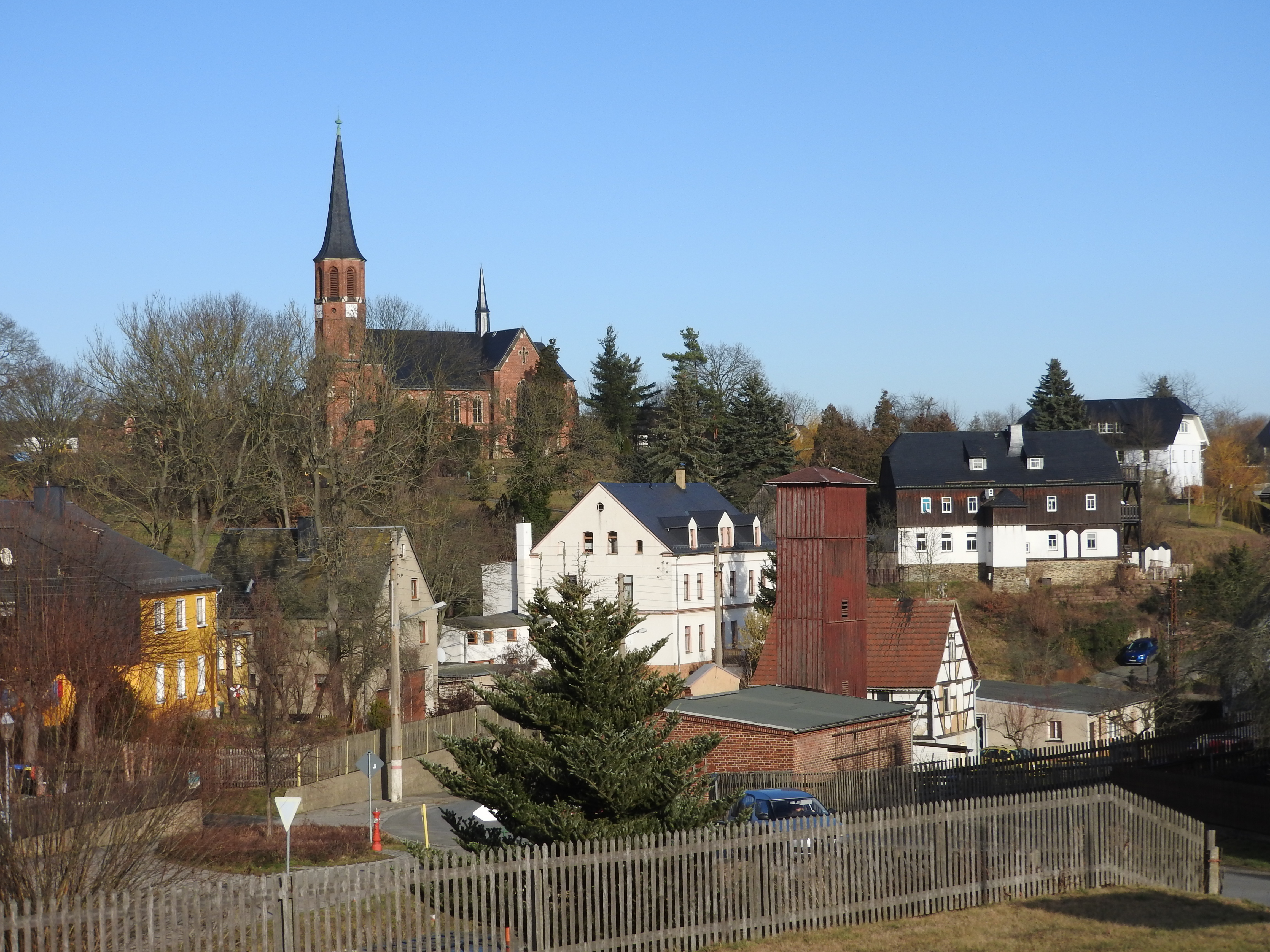 Mohlsdorf, Thüringen